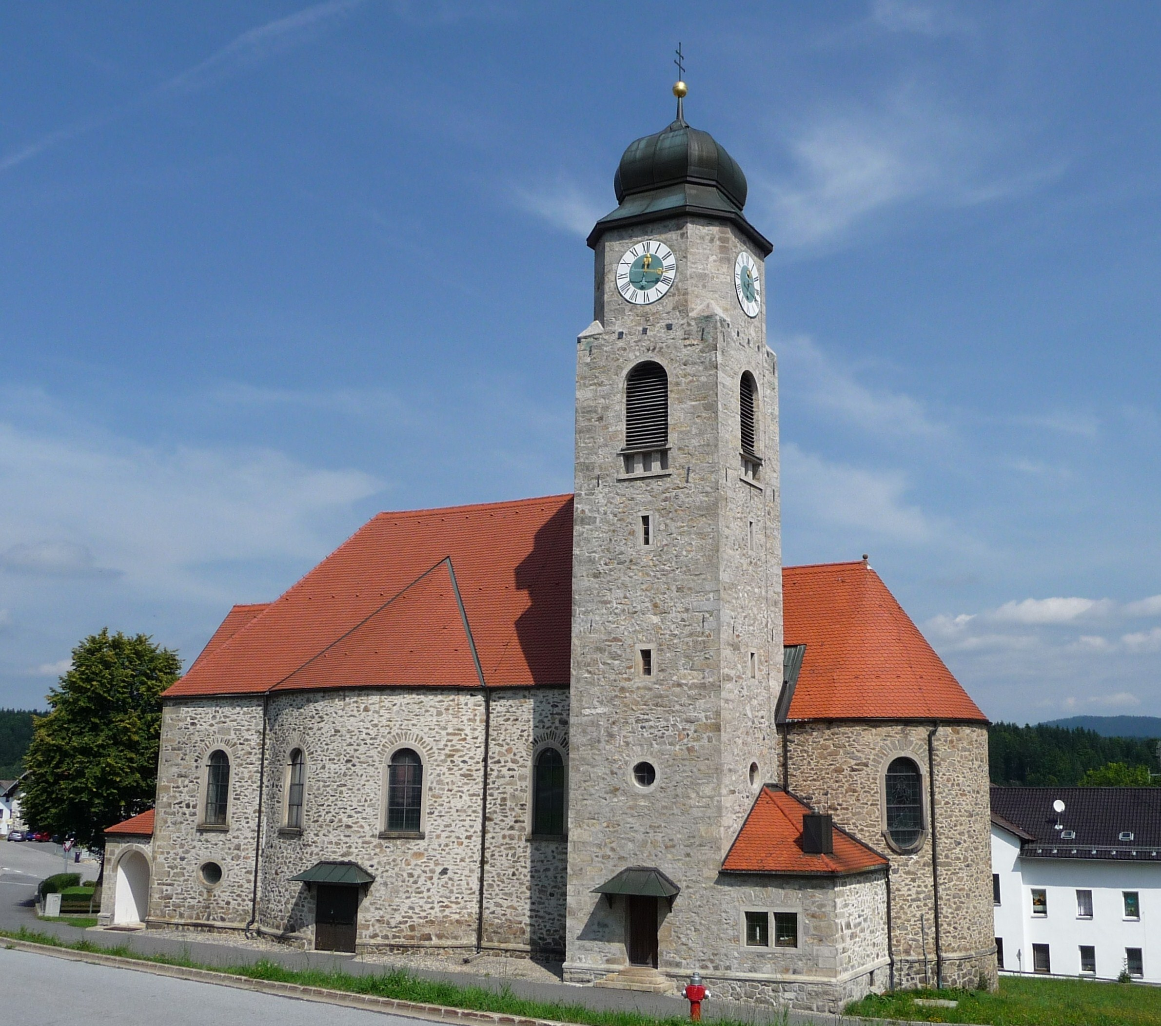 Die Pfarrkirche Maria Heimsuchung in Untermitterdorf